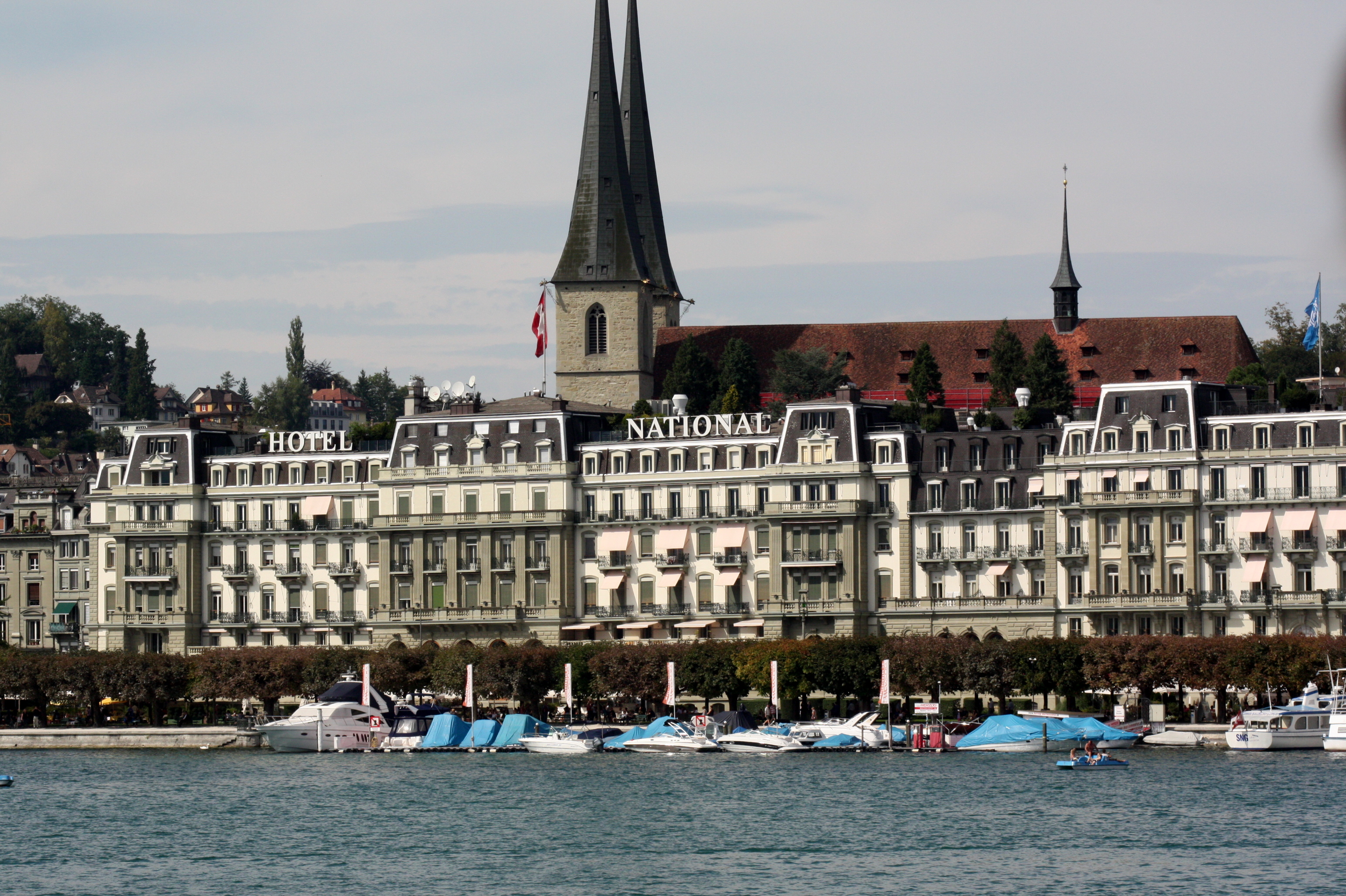 Grand-Hotel National, Luzern